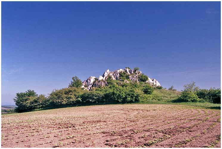 Přírodní památka Kočičí skála.